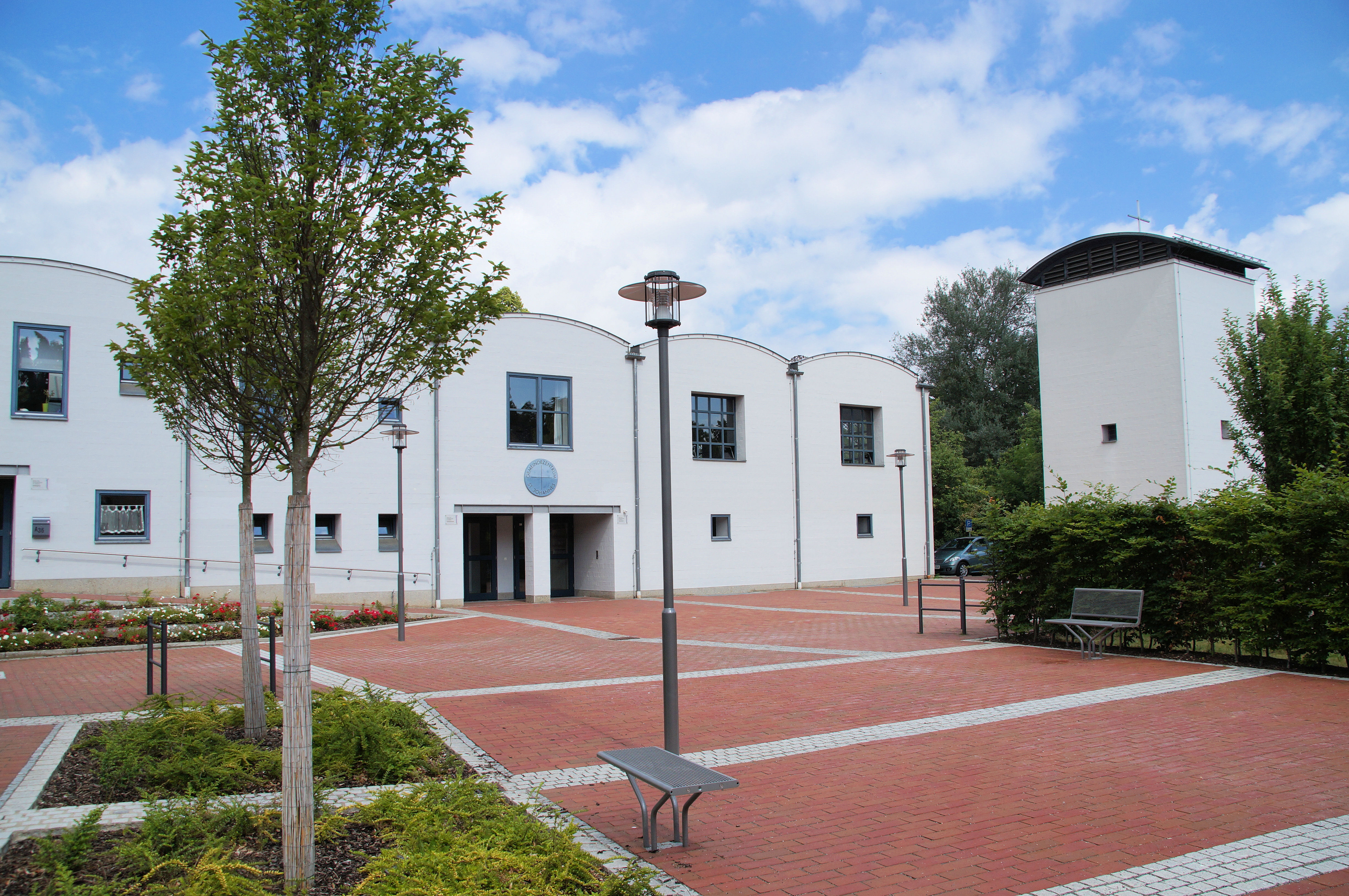 Evangelisch-lutherische Pfarrkirche St. Johannes und zugehöriges Gemeindezentrum in der Augsburger Straße in Regensburg, erbaut 1993 nach Plänen von Theordor Hugues